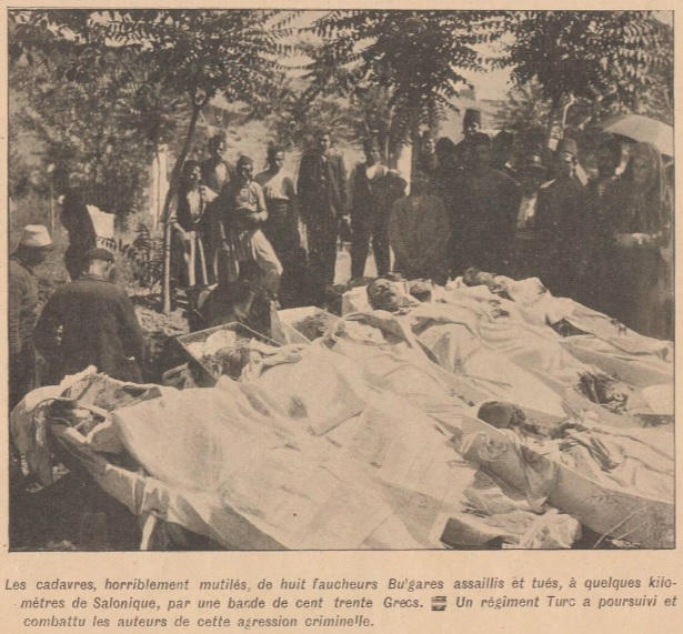 Българи от Пожарско, убити от гръцка чета